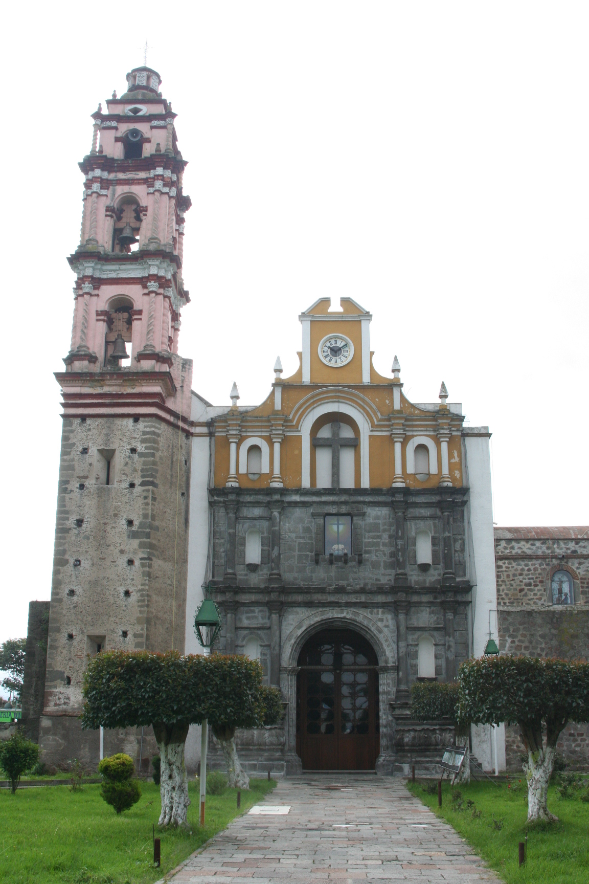 fachada del Templo de Santa Cruz Tlaxcala